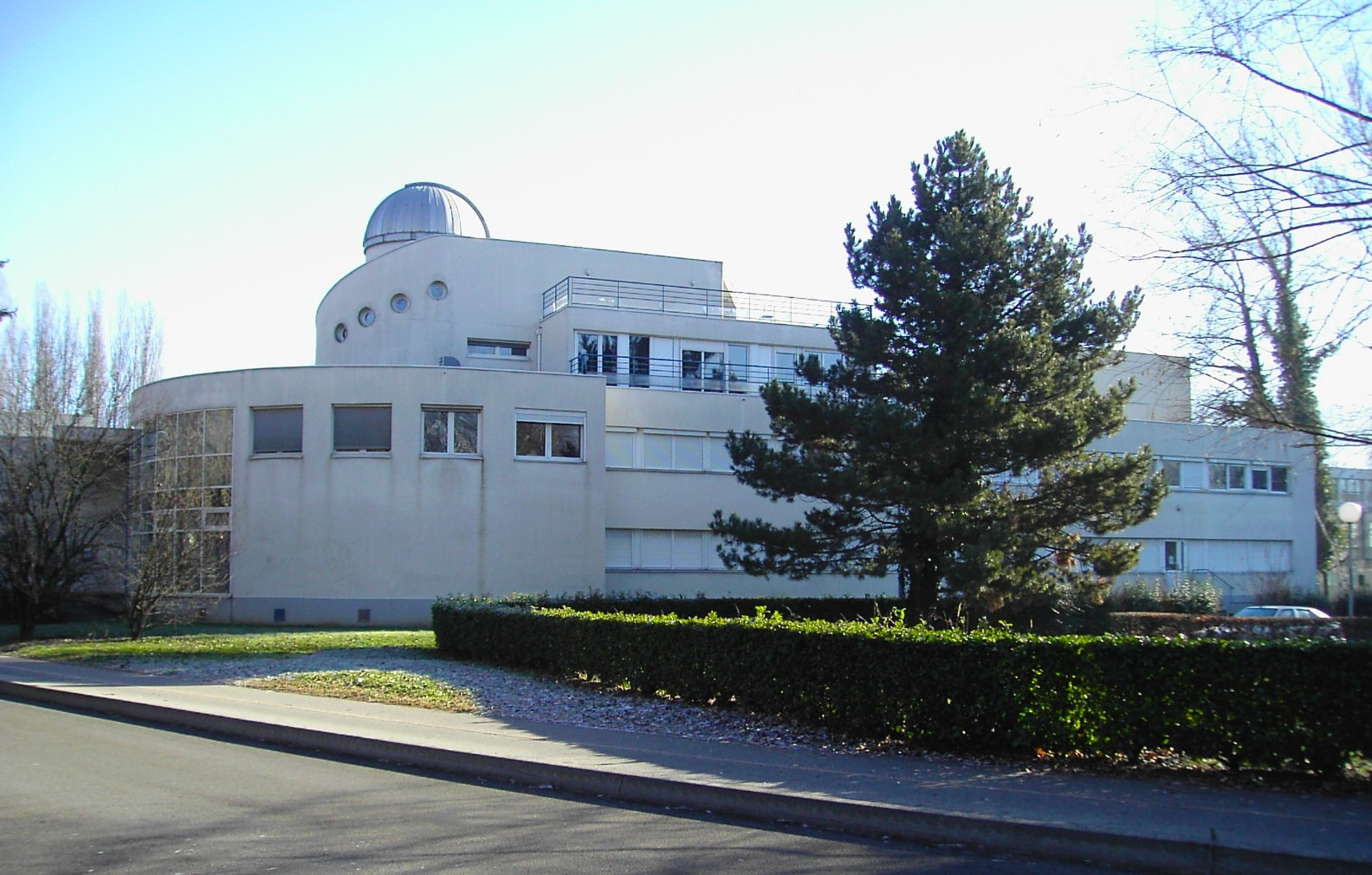 Institut de planétologie et d'astrophysique de Grenoble, (rue de la piscine, sur le campus universitaire)